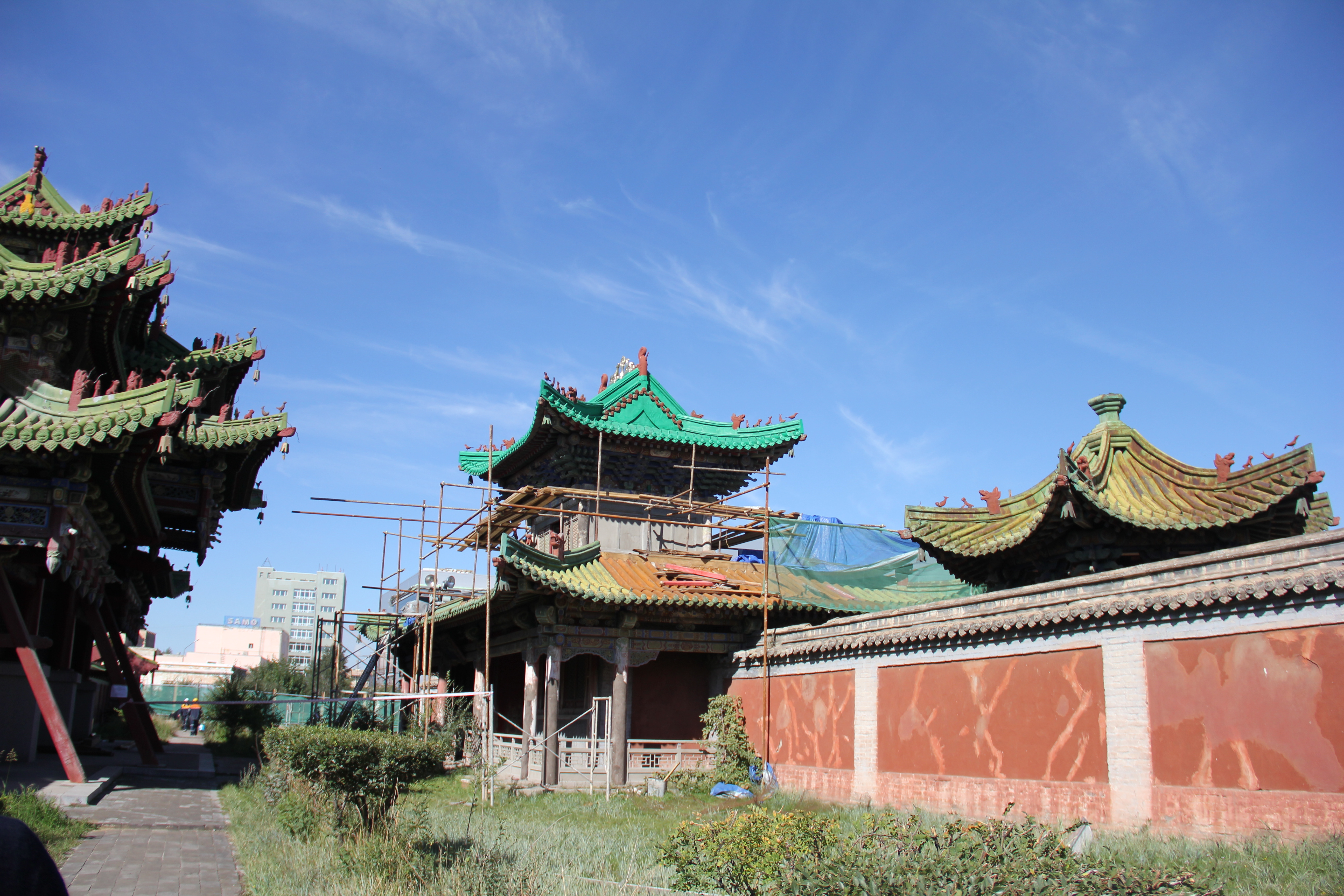 Монгол: Махранзын сүмийг сэргээн засварлаж байгаа нь